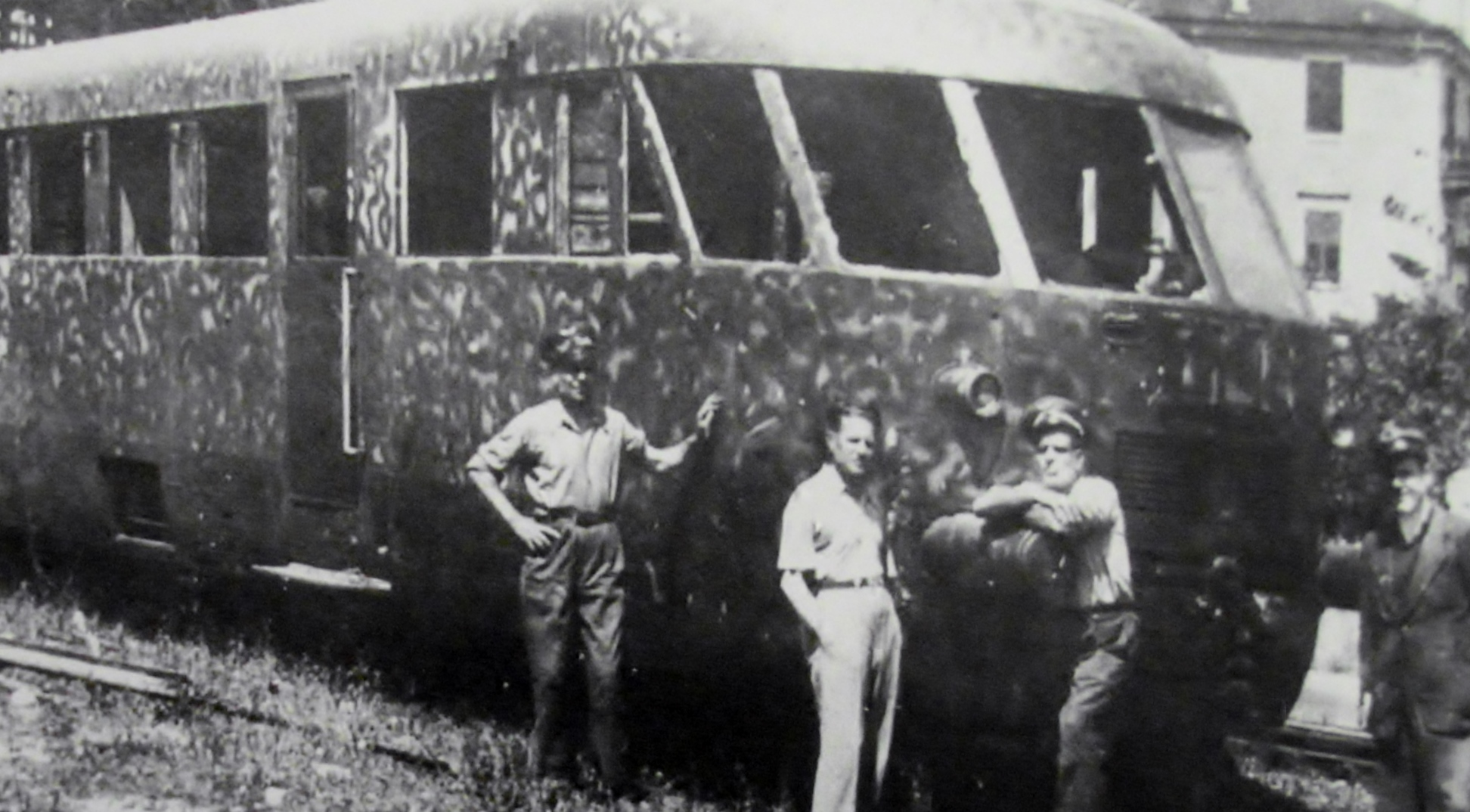 Automotrice Breda mimetizzata presso Mezzolombardo nel 1943